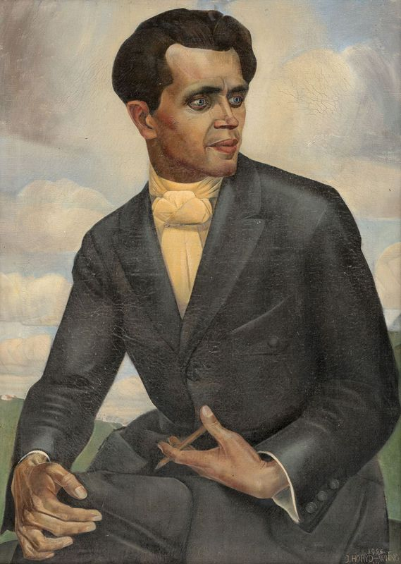 Язэп Горыд. Партрэт скульптара Рафала Яхімовіча